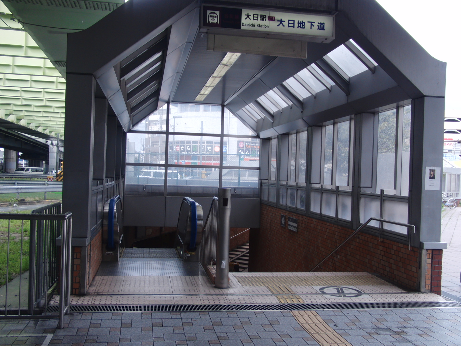 大日駅とイオンモール大日を繋ぐ階段を撮影